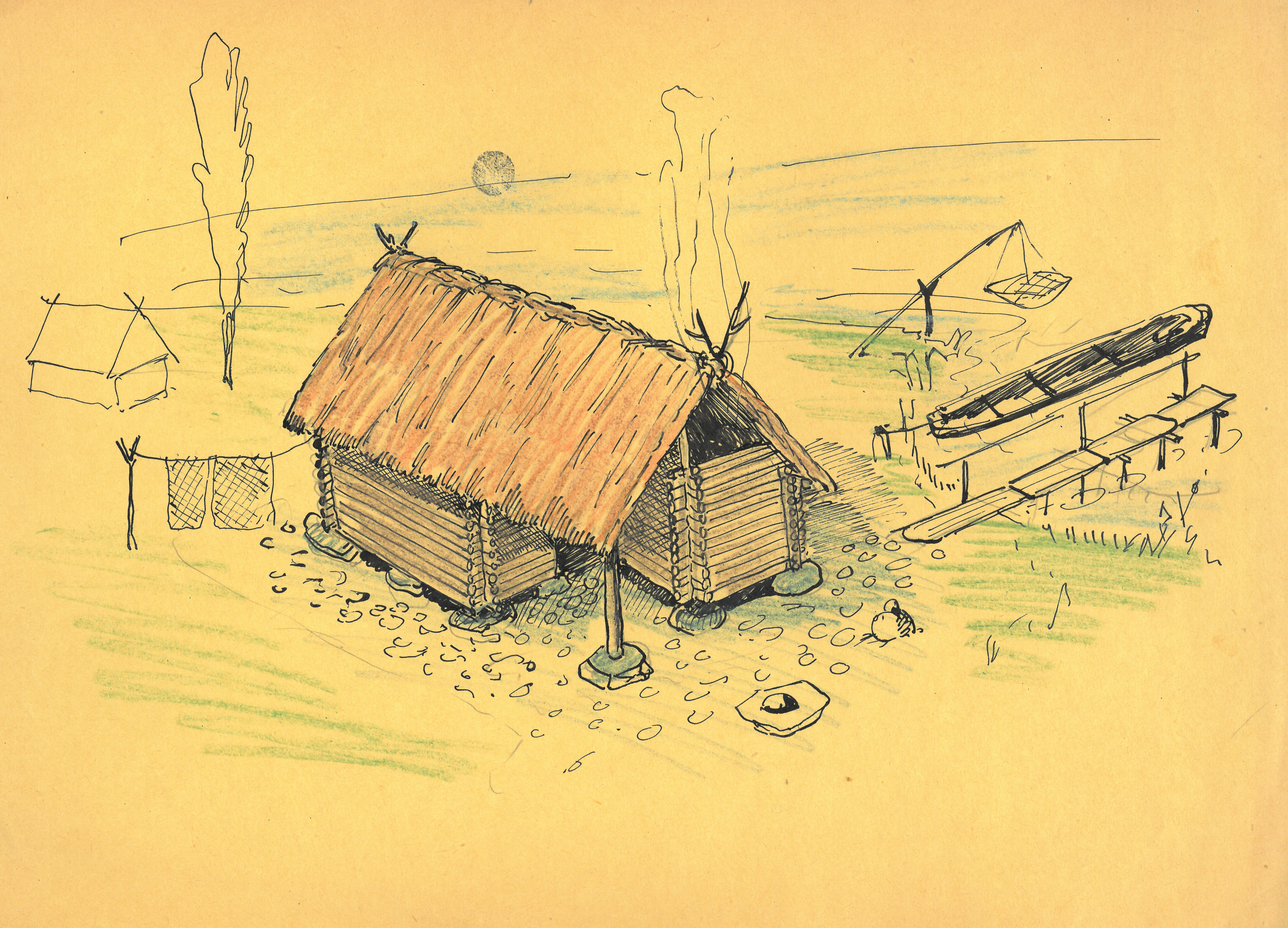 Nachlass Reinhold Bosch im Besitz der Kantonsarchäologie Aargau Mappe Seengen-Riesi In den Jahren 1923 und 1925 führte Reinhold Bosch Ausgrabungen in der Seeufersiedlung von Seengen-Riesi durch, die in die Spätbronzezeit (11. – 9. Jh. v. Chr.) datiert. Insbesondere wurde im September 1923 der Unterbau eines Pfahlbaus freigelegt. Bei der vorliegenden Zeichnung dürfte es sich um eine freie Rekonstruktion eines solchen handeln.